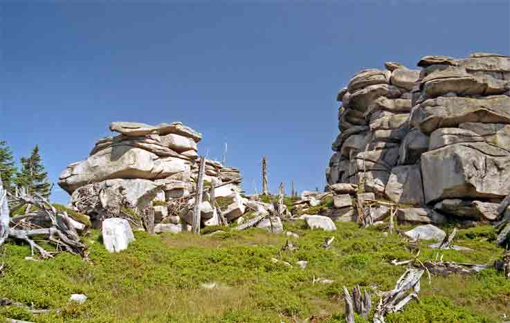 Skalní útvary na Hutniczy Grzbiet autor:Zp